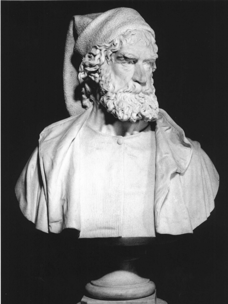 Busto di Giovanni Caboto, opera di Augusto Benvenuti del 1881. Il busto fa parte del Panteon Veneto, conservato presso Palazzo Loredan di Campo Santo Stefano a Venezia.